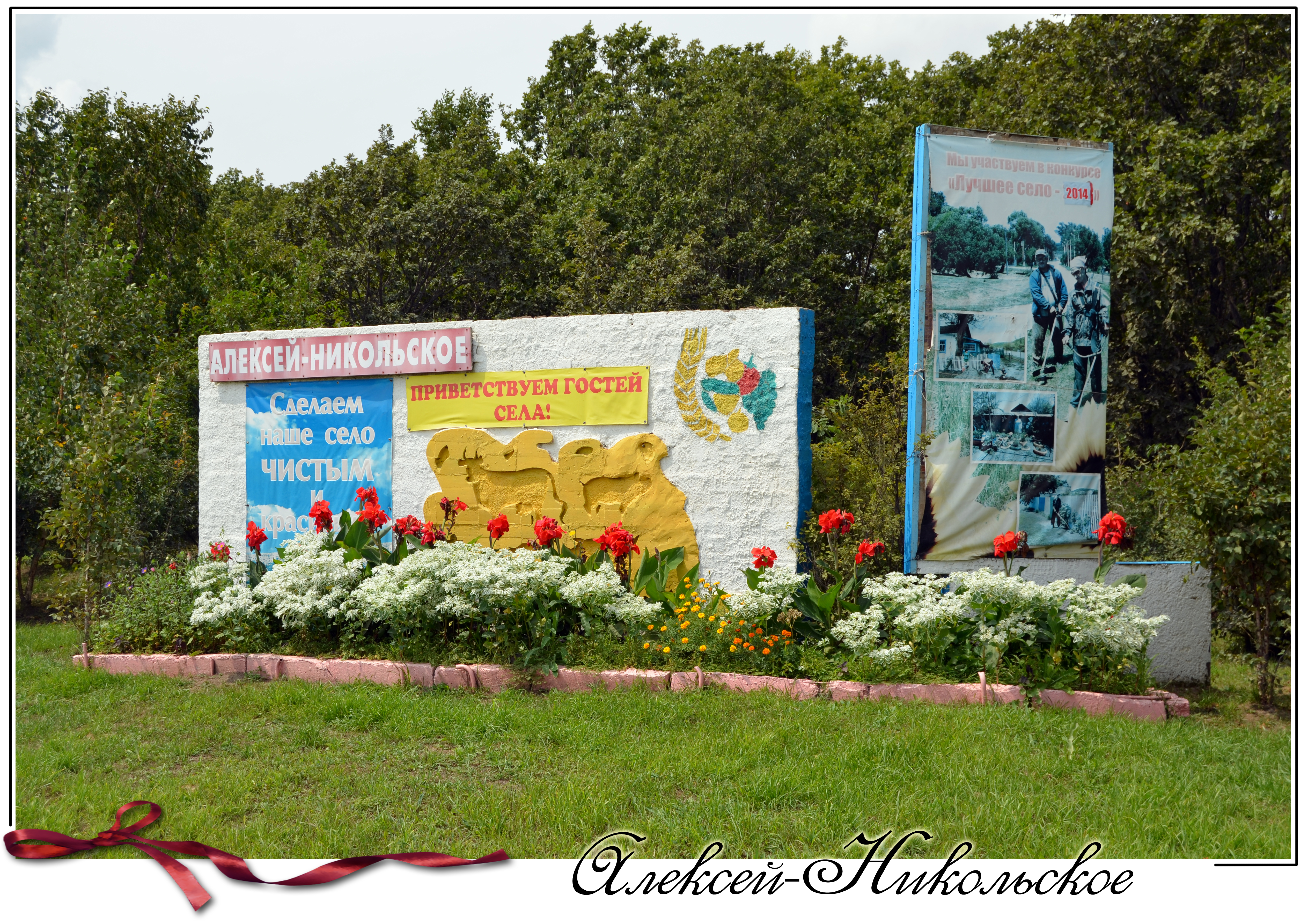 Въезд в село.